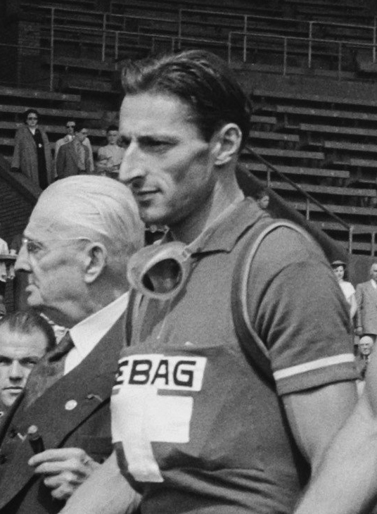 Deelnemers Tour de France, Zwitserse ploeg [Ferdi Kübler] (features)